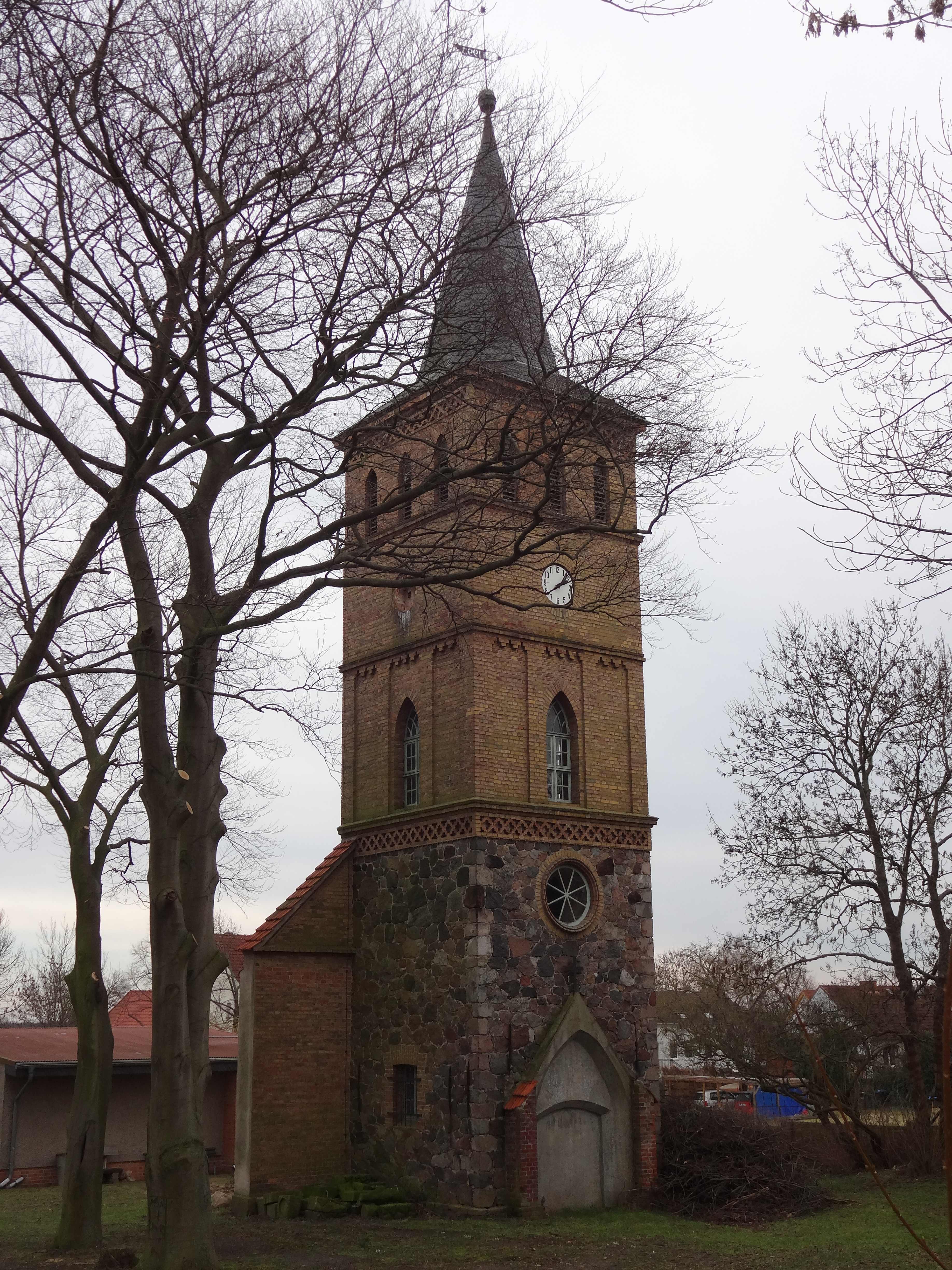 Denkmalgeschützter Kirchturm in Brädikow (Gemeinde Wiesenaue) in Brandenburg